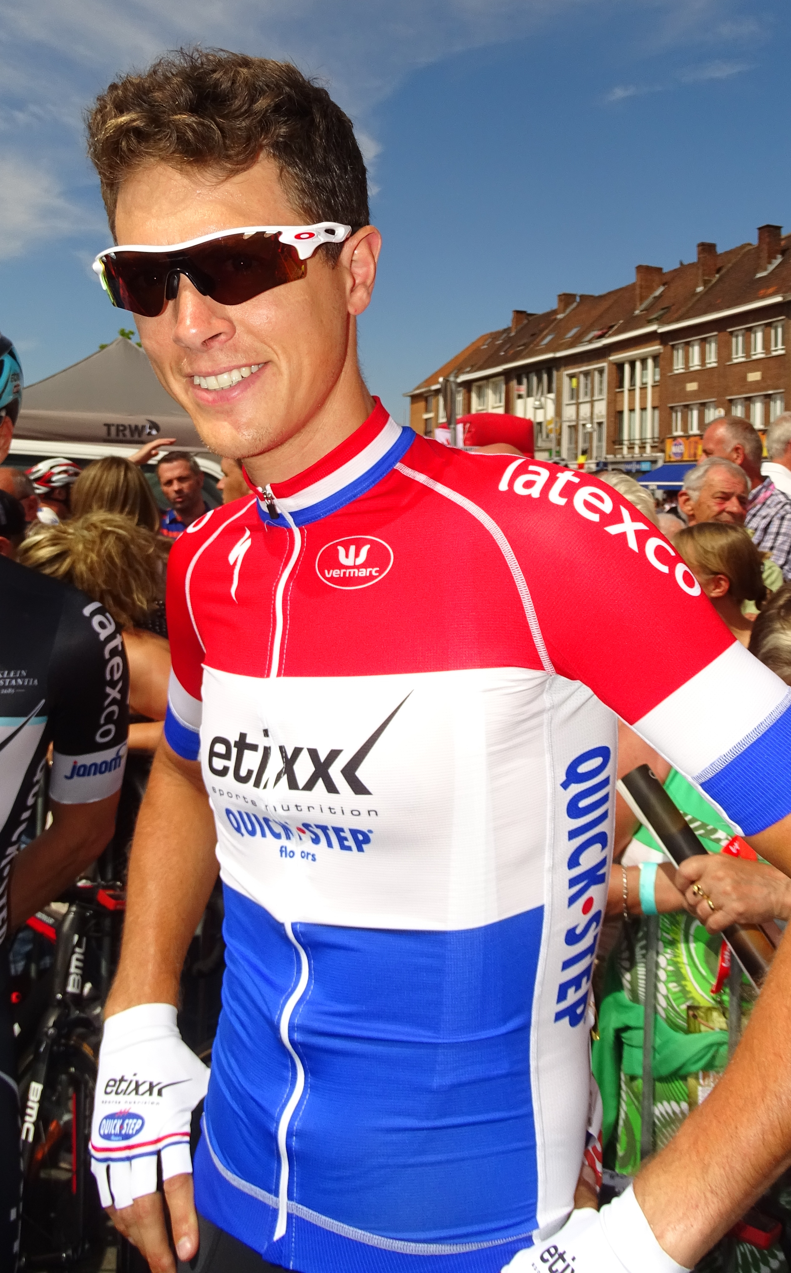 Reportage réalisé le mercredi 22 juillet à l'occasion du départ du Grand Prix Pino Cerami 2015 à Saint-Ghislain, Belgique.